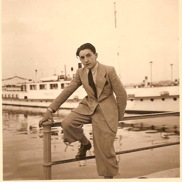 Alberto Dalla Volta al porto di Desenzano del Garda